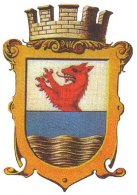 Wappen der Gemeinde Amstetten, Niederösterreich